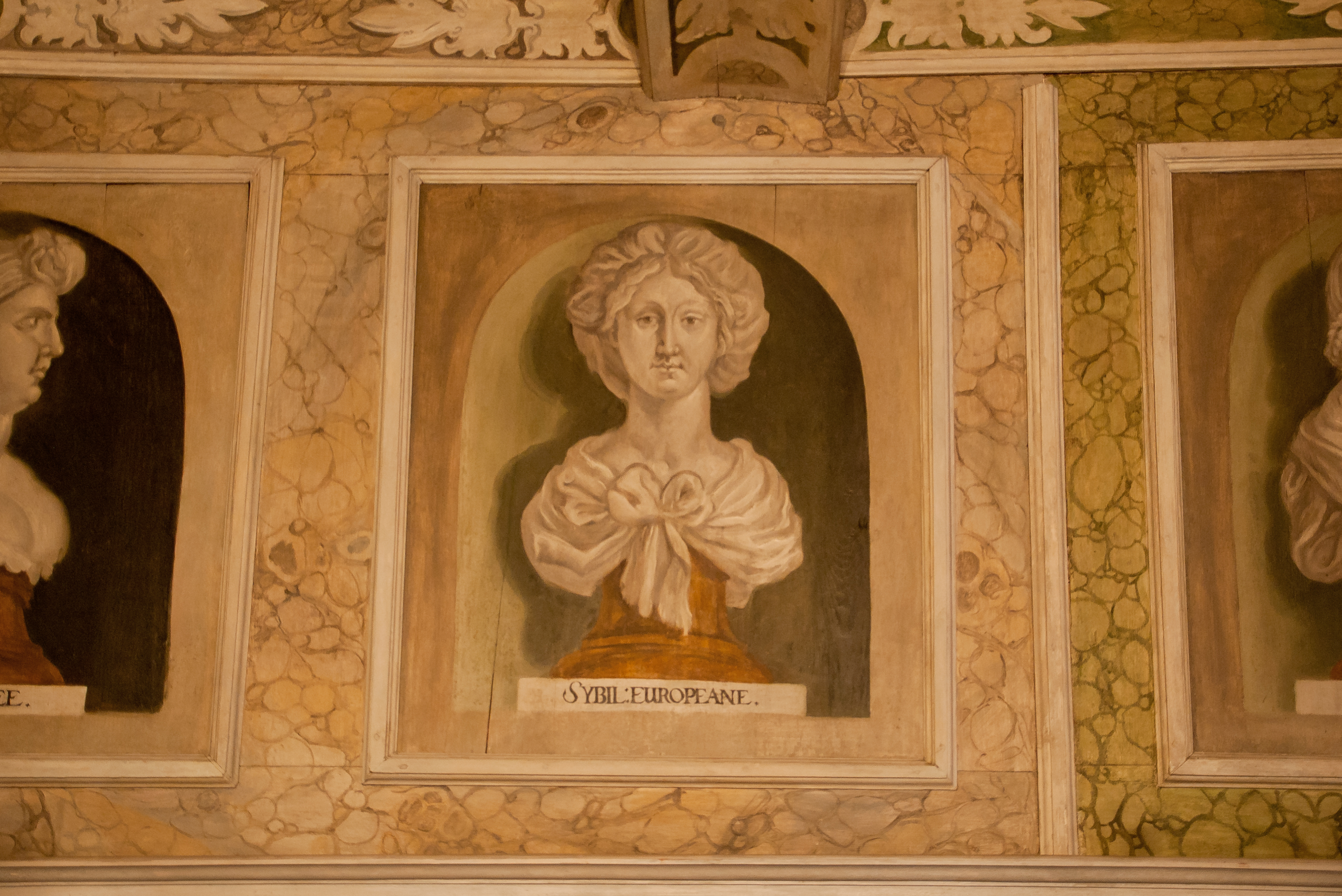 Wandgemälde "Sybill. Europeane" im Weingut Hoflößnitz